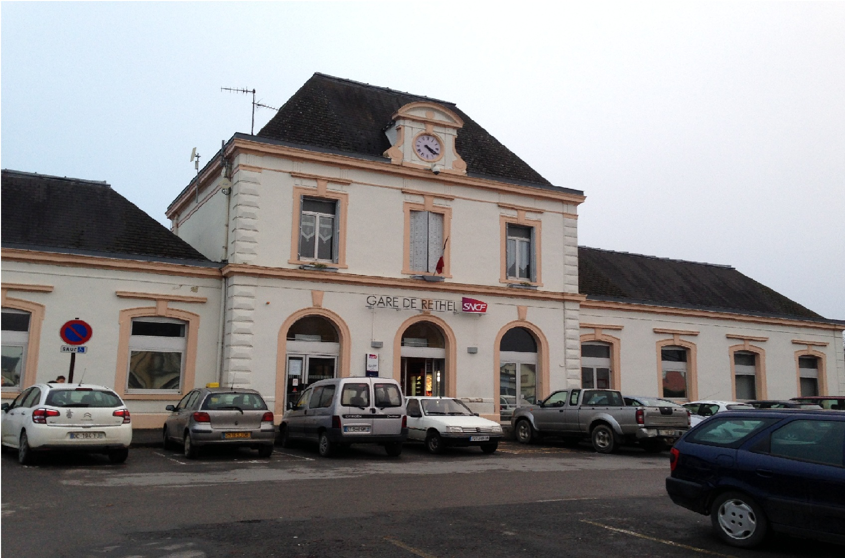 Gare de Rethel